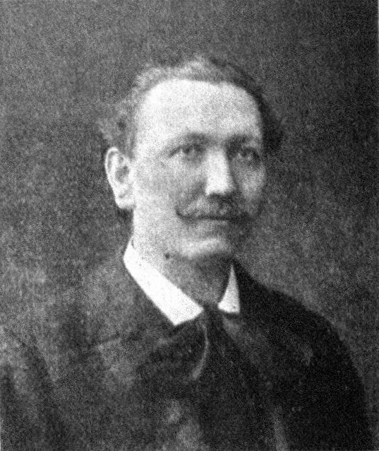 Österreichischer Politiker, Reichsratswahl 1907, Name siehe Dateiname